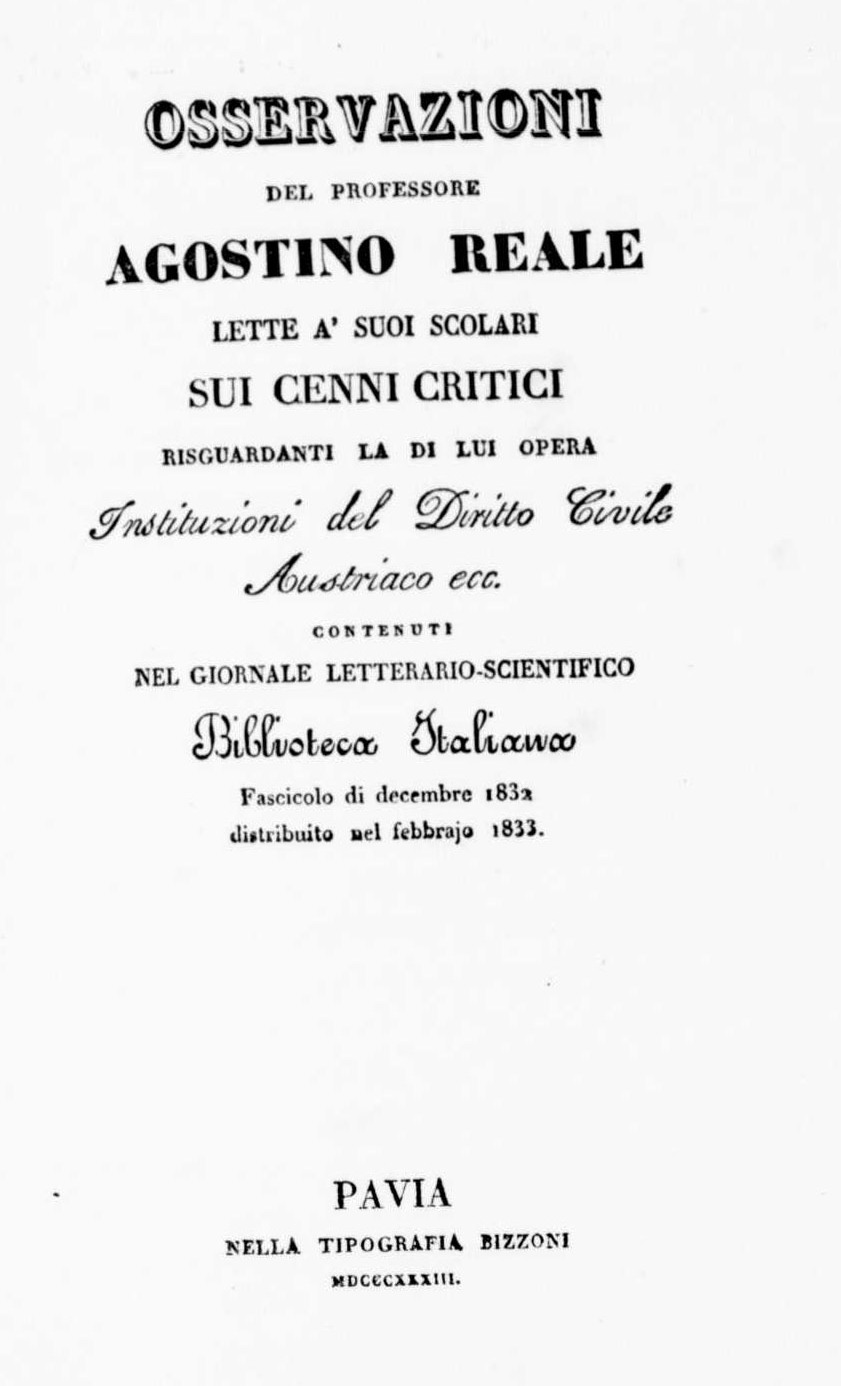 Frontespizio